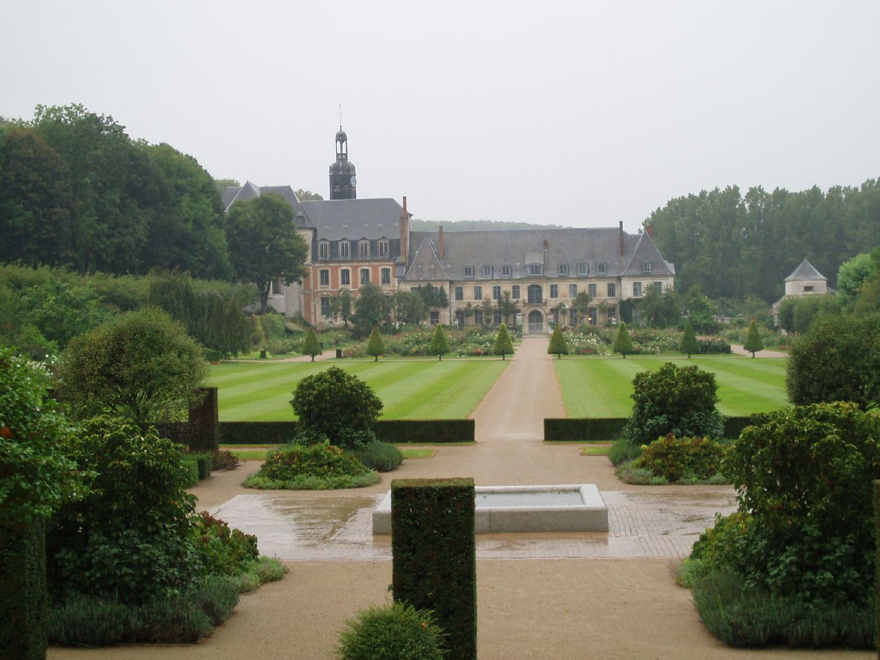 Abbaye de Valloires, Argoules, Somme, France